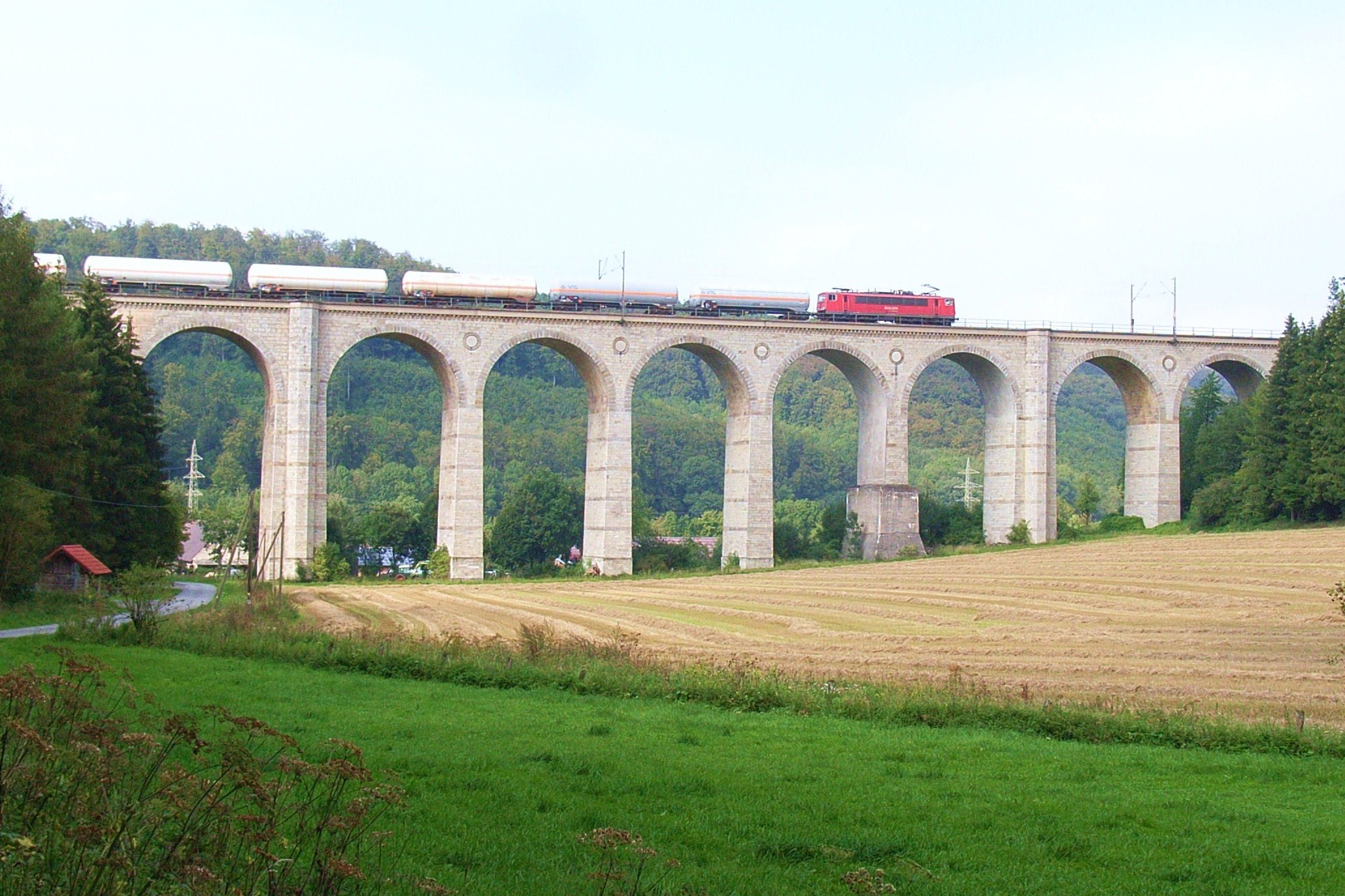 Kleines Viadukt Altenbeken mit Güterzug